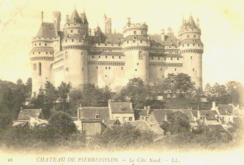 Vue du château de Pierrefonds, vers 1910